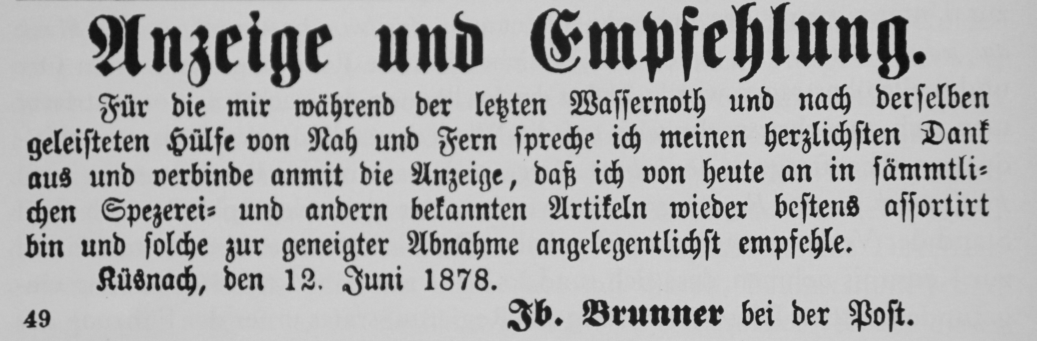 Nach der Überschwemmung vom Juni 1878: Inserat aus dem «Anzeiger des Bezirkes Meilen» vom 19. Juni 1878